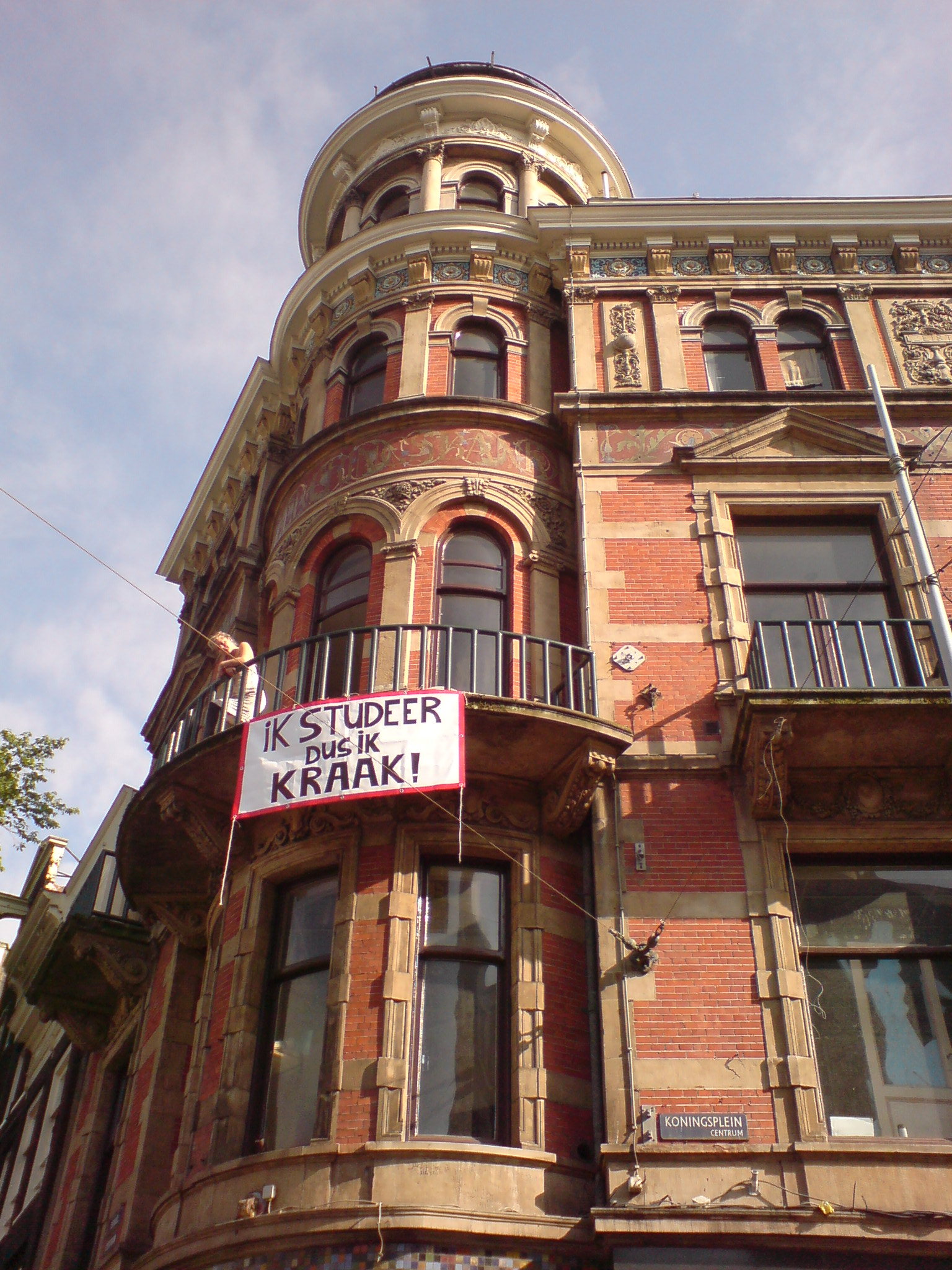 Gebouw Kosmos, Koningsplein 1 1017 BB te Amsterdam (NH). Op de hoek van Koningsplein en Singel in 1890-1891 opgetrokken WINKELPAND met KANTOREN en een CONCIERGEWONING naar een ontwerp in Neo-barok van Th.G. Schill en D.H. Haverkamp in opdracht van de directeuren der Verzekeringsbank 'Kosmos'. De winkel bevond zich op de beganegrond, de kantoren - van de verzekeringsbank 'Kosmos' zelf - waren gevestigd op de eerste en tweede verdieping en de conciergewoning bevond zich op de derde verdieping.